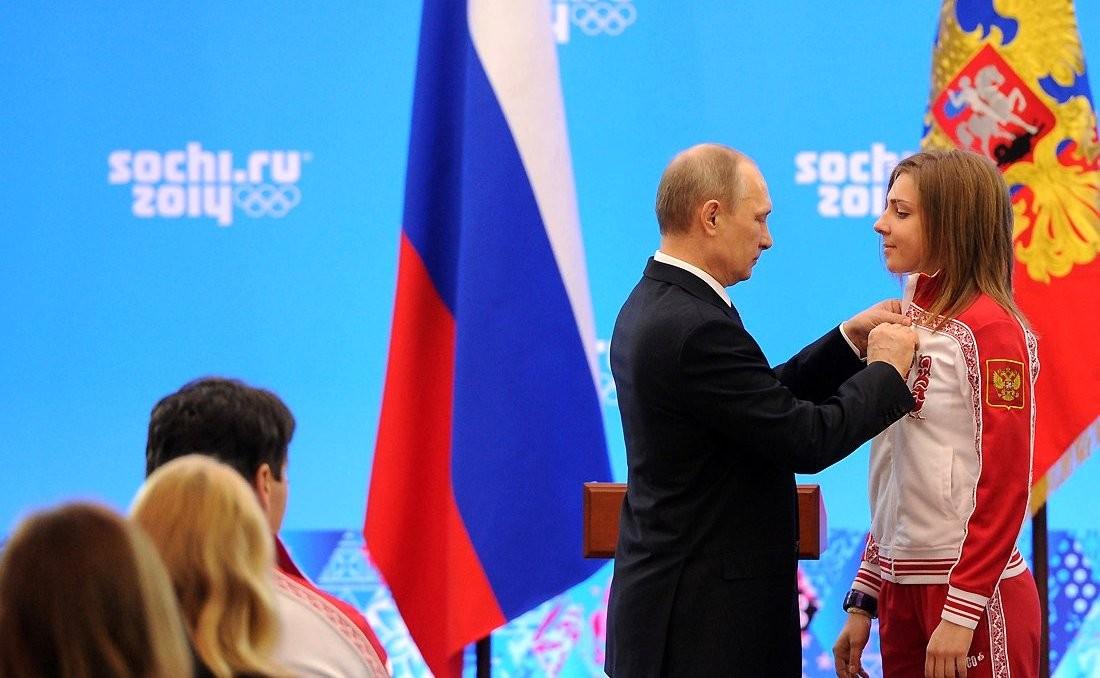 Медалью ордена «За заслуги перед Отечеством» второй степени награждена бронзовый призёр Олимпийских игр в скелетоне Елена Никитина.